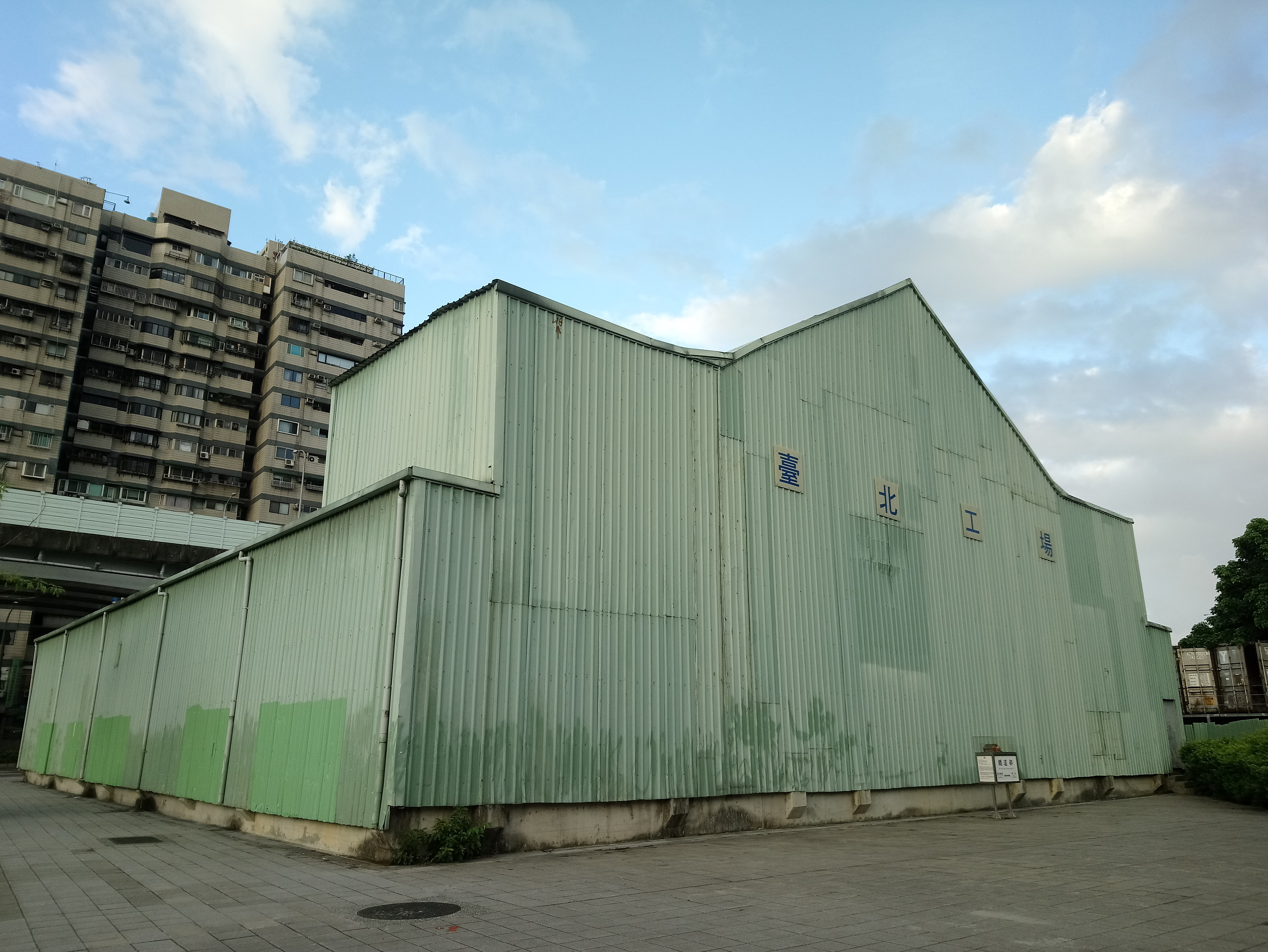 臺灣總督府交通局鐵道部臺北工場,臺北市大同區延平次分區玉泉里